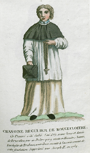 Collection de costumes de tous les ordres monastiques, supprimés à differentes époques, dans la ci-devant Belgique, Bruxelles, Philippe Joseph Maillart et sœur, 1811